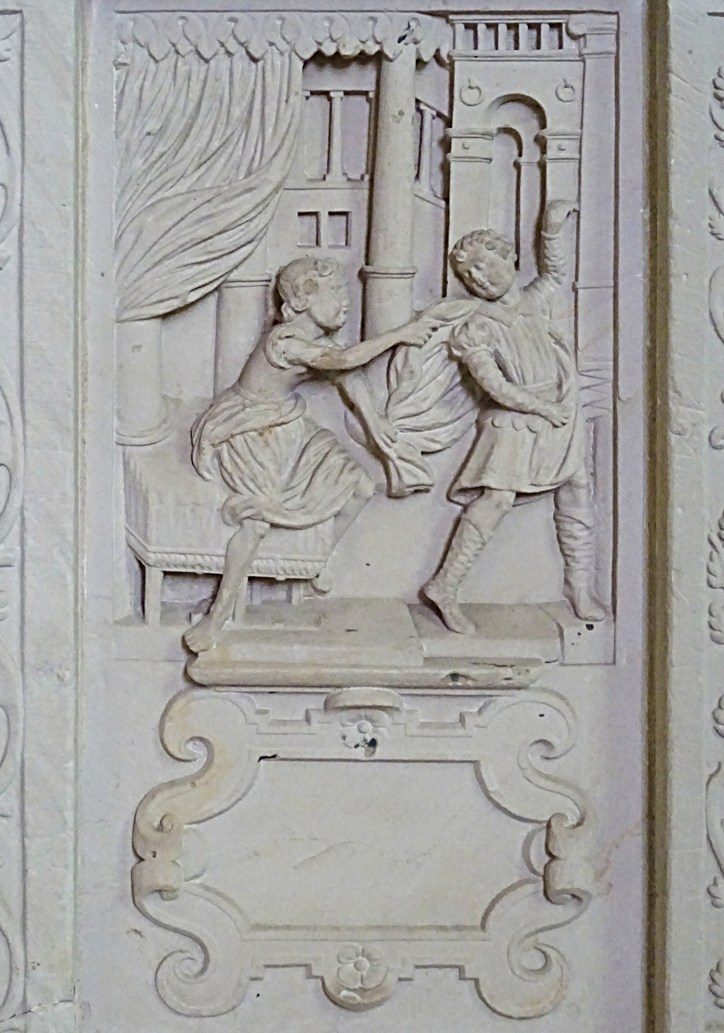 Steinbilderbibel in der St. Annenkirche (Eisleben), 13/29, Josef und die Frau des Potifar